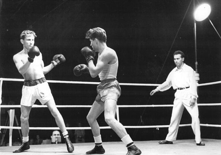 Niedzwiedzki, Kellner Zentralbild III 15 Motive 2.10.1954 Internationales Boxturnier im Wassil-Lewski-Stadion in Sofia im September 1954 (Bulgarien) Das grosse internationale Länderturnier im Boxen wurde am 22. September abgeschlossen. Die polnische Staffel belegte mit 10:0 Punkten den ersten Platz. An zweiter Stelle steht die Sowjetunion, gefolgt von Bulgarien, Ungarn, der Tschechoslowakischen Republik und der Mannschaft der Deutschen Demokratischen Republik. UBz: Boxkampf zwischen Niedzwiedzki (Poen) und (?) Kellner (Ungarn), Halbschwergewicht.